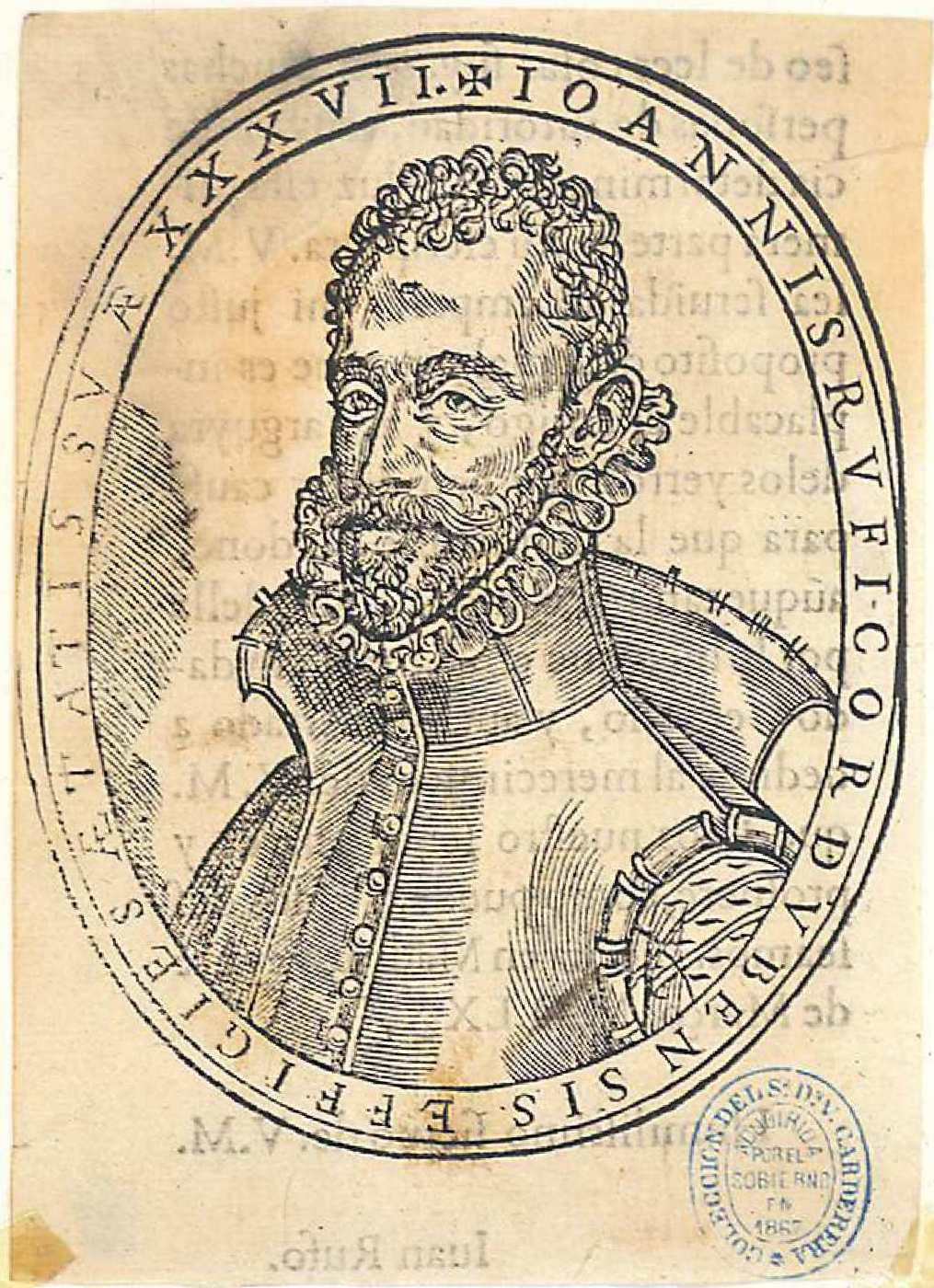 Juan Rufo Gutiérrez, ilustración de La Avstriada, Madrid, 1584. Inscripción: Ioannis Rvfi Cordvbensis effigies. Aetatis svae XXXVII. Biblioteca Nacional de España